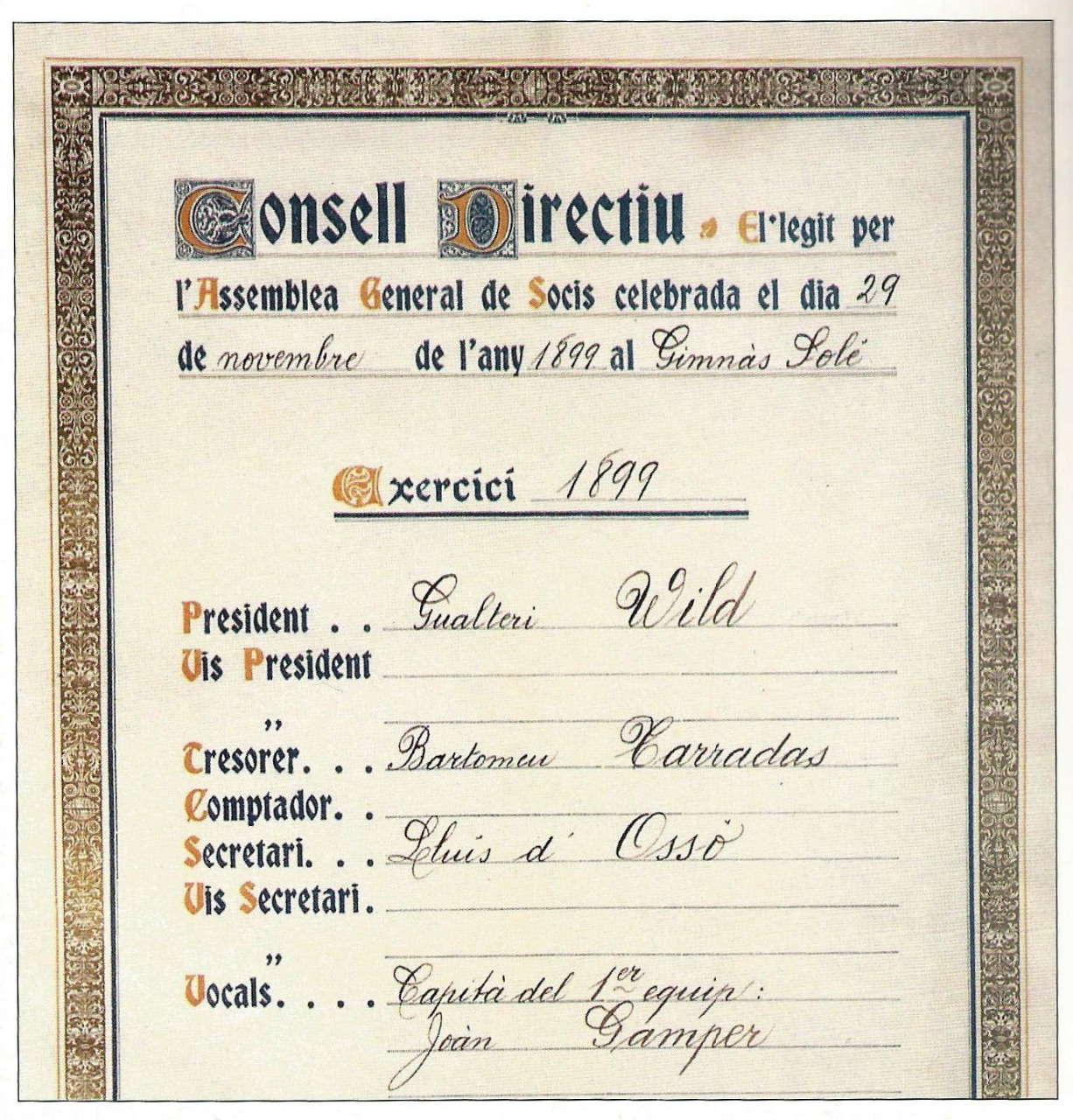 Pàgina extreta del llibre d'actes del Futbol Club Barcelona, amb data del 29 de novembre de 1899, on es mostra la primera junta directiva escollida.